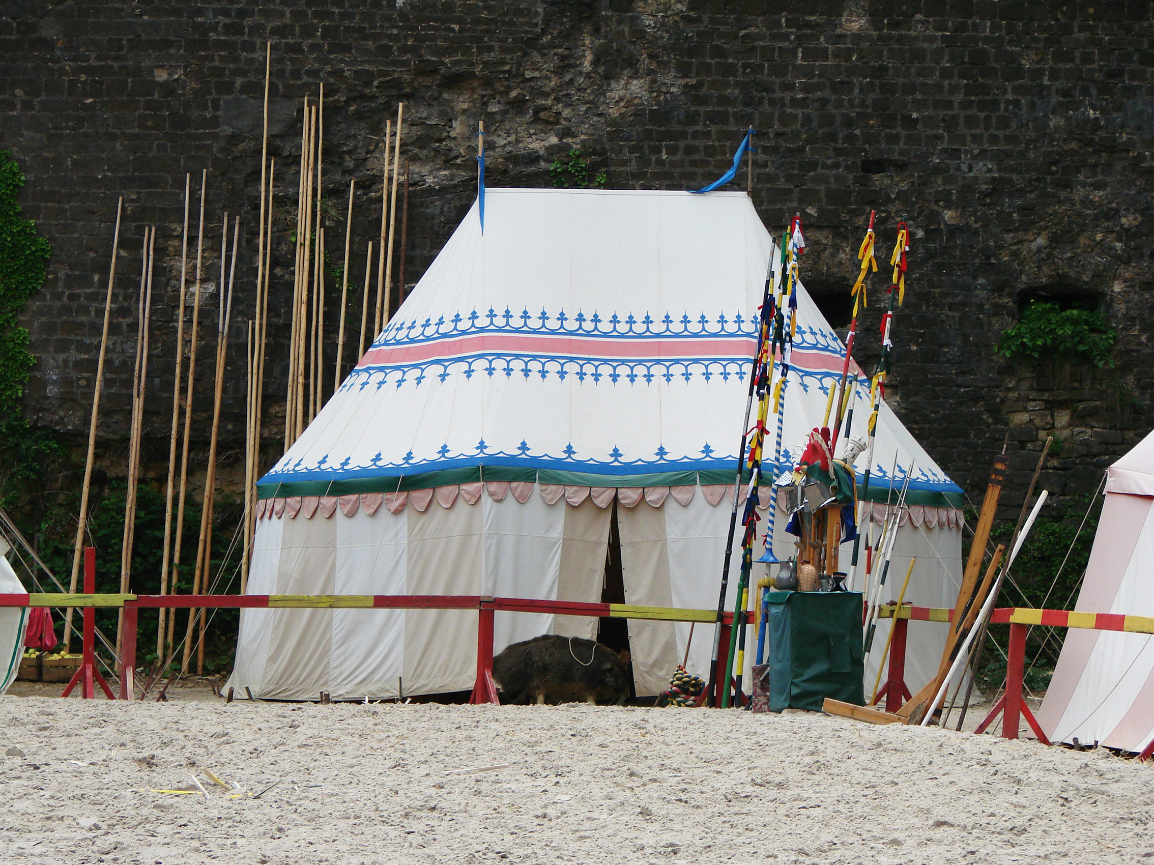 Tente dans un spectacle de tournoi: la troupe Normani,au festival médiéval de Sedan, le 20 Mai 2007.